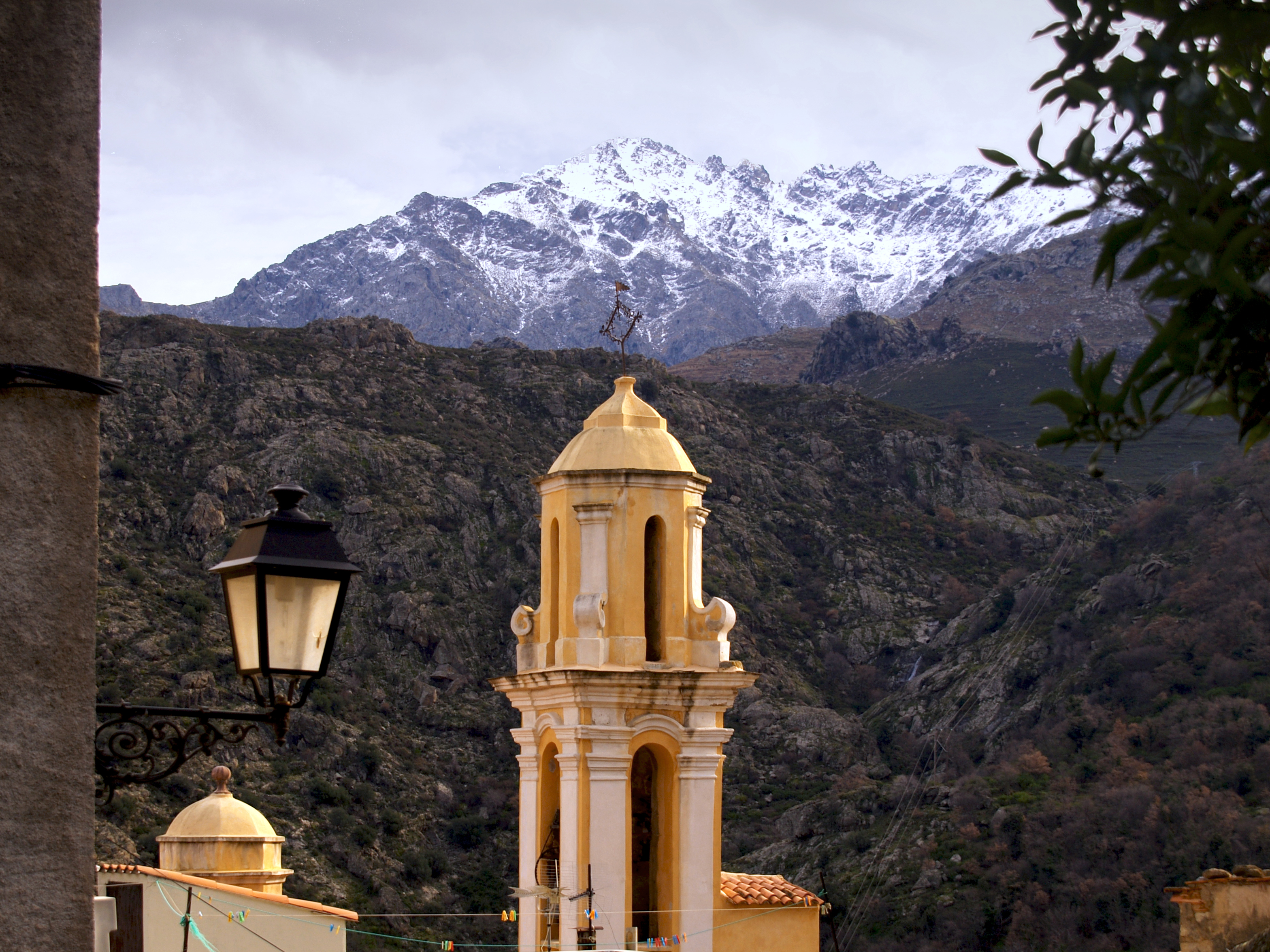 Muro, Balagne (Corse)- Campanile de l'église de la Santissima Annunziata